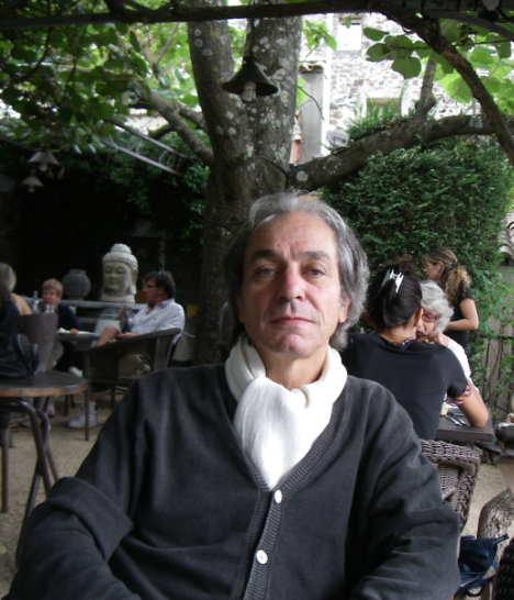 Frédéric Monneyron